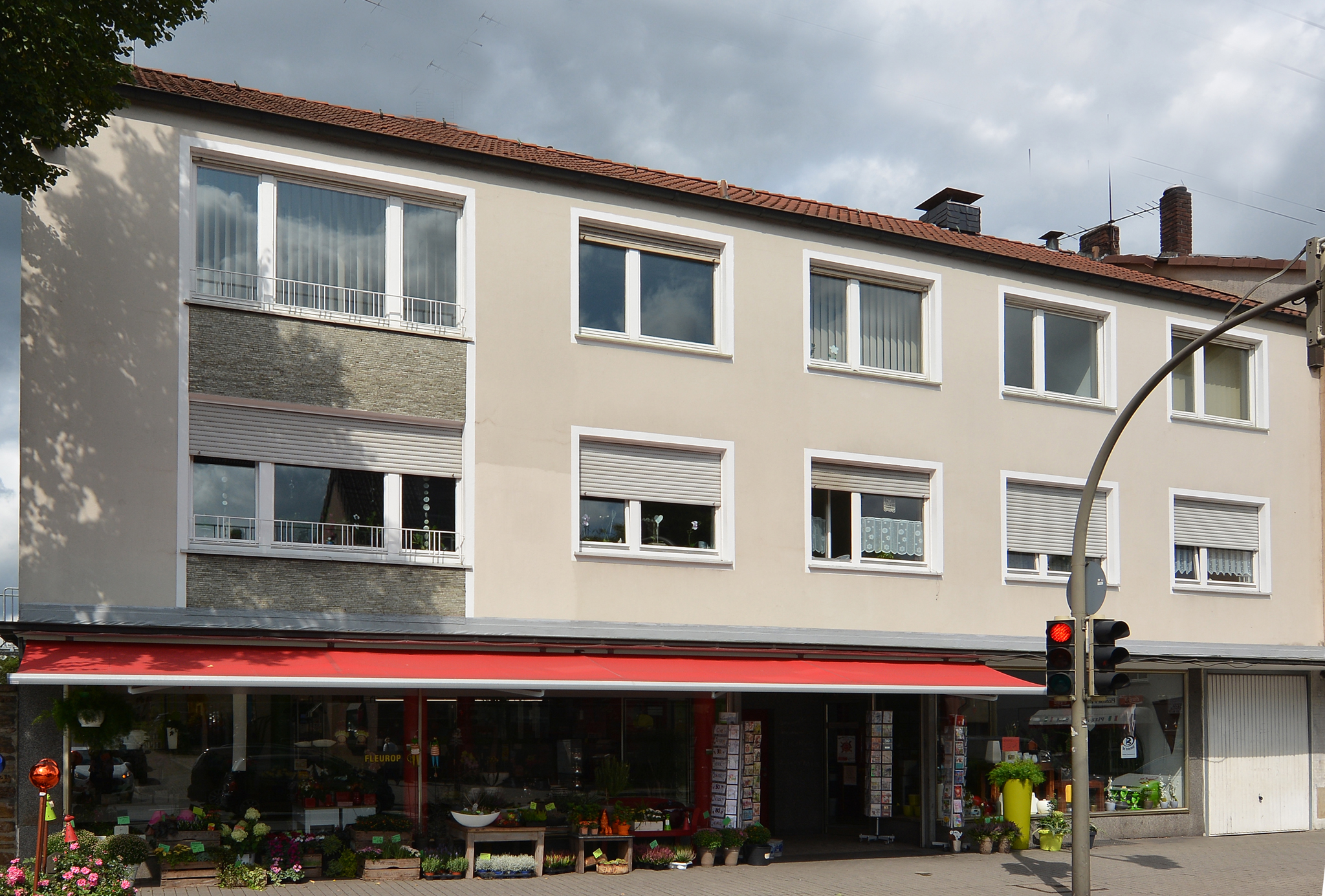 Wohnhaus eines Opfers des Naziterrors